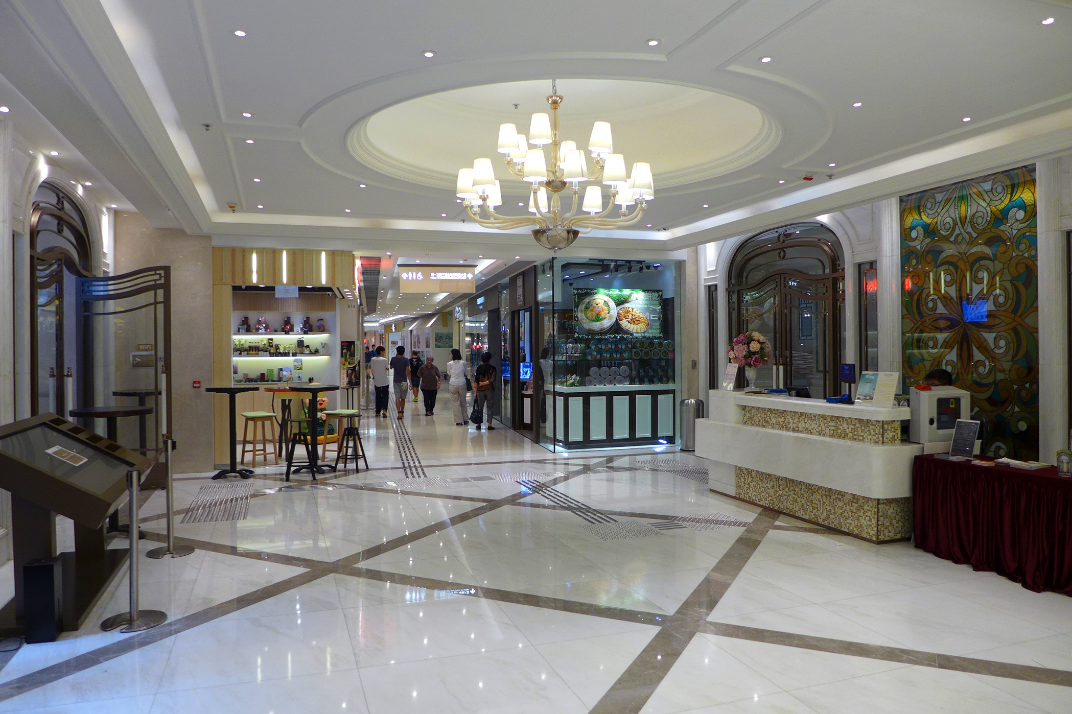 Lee Tung Avenue Basement Lobby